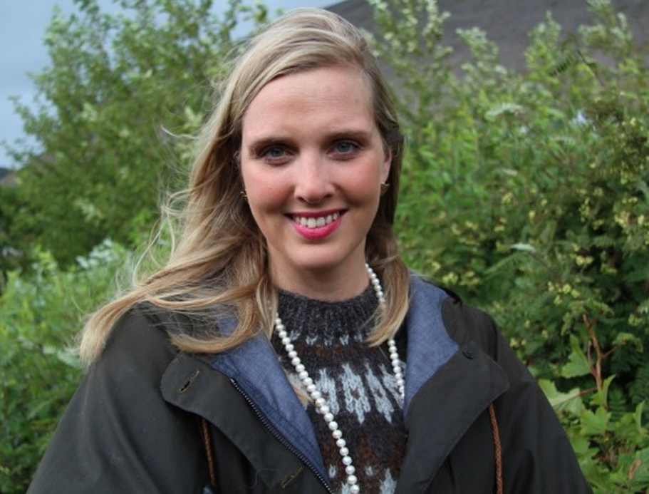 bæjarstjóri Akureyrar